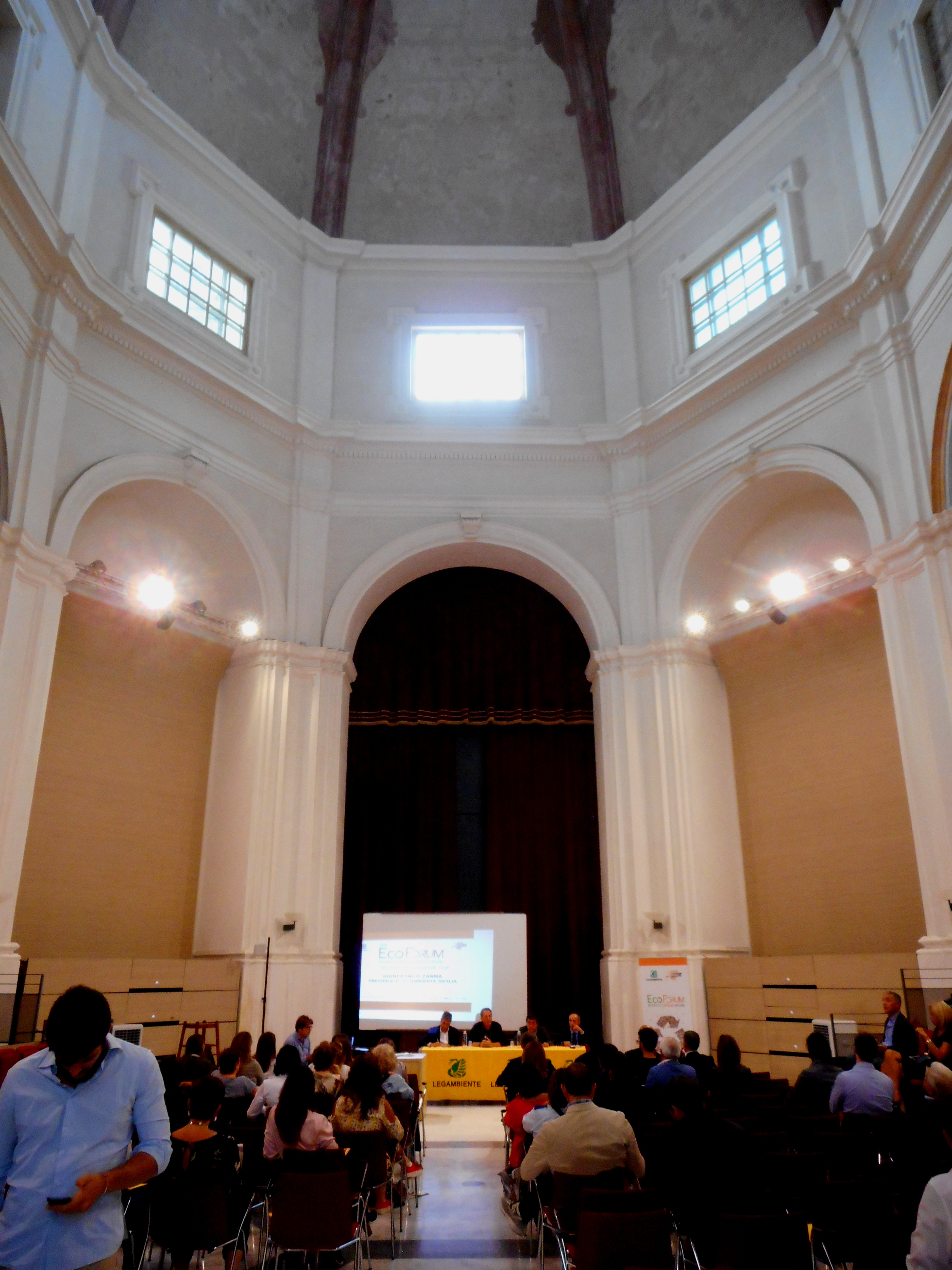 chiesa di San Mattia dei Crociferi This is a photo of a monument which is part of cultural heritage of Italy.